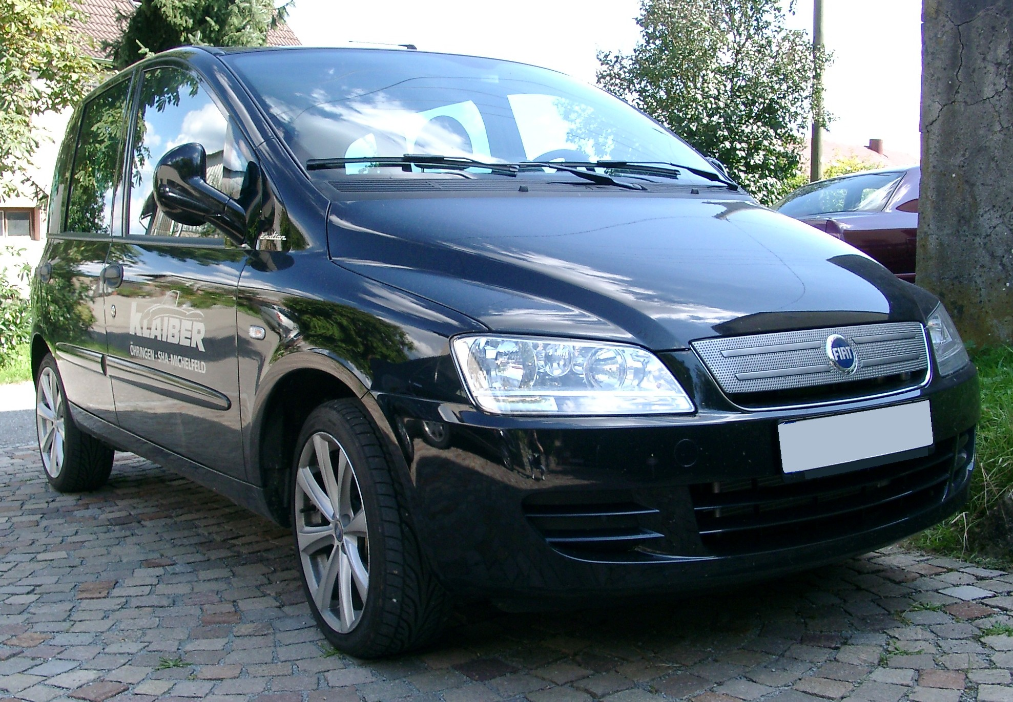 Fiat Multipla, 2. Generation